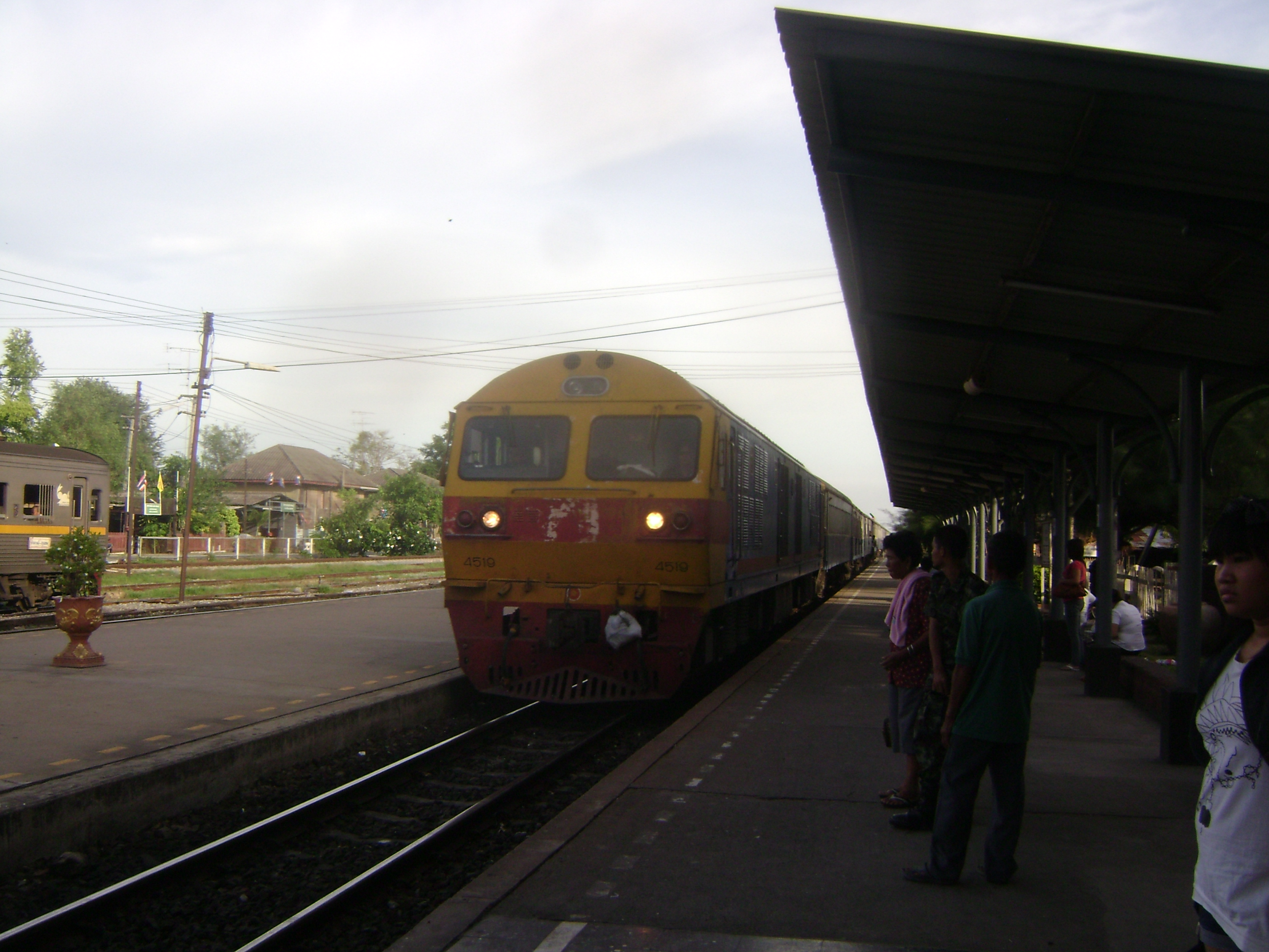 รถจักรดีเซลไฟฟ้า Hitachi หมายเลข 4519